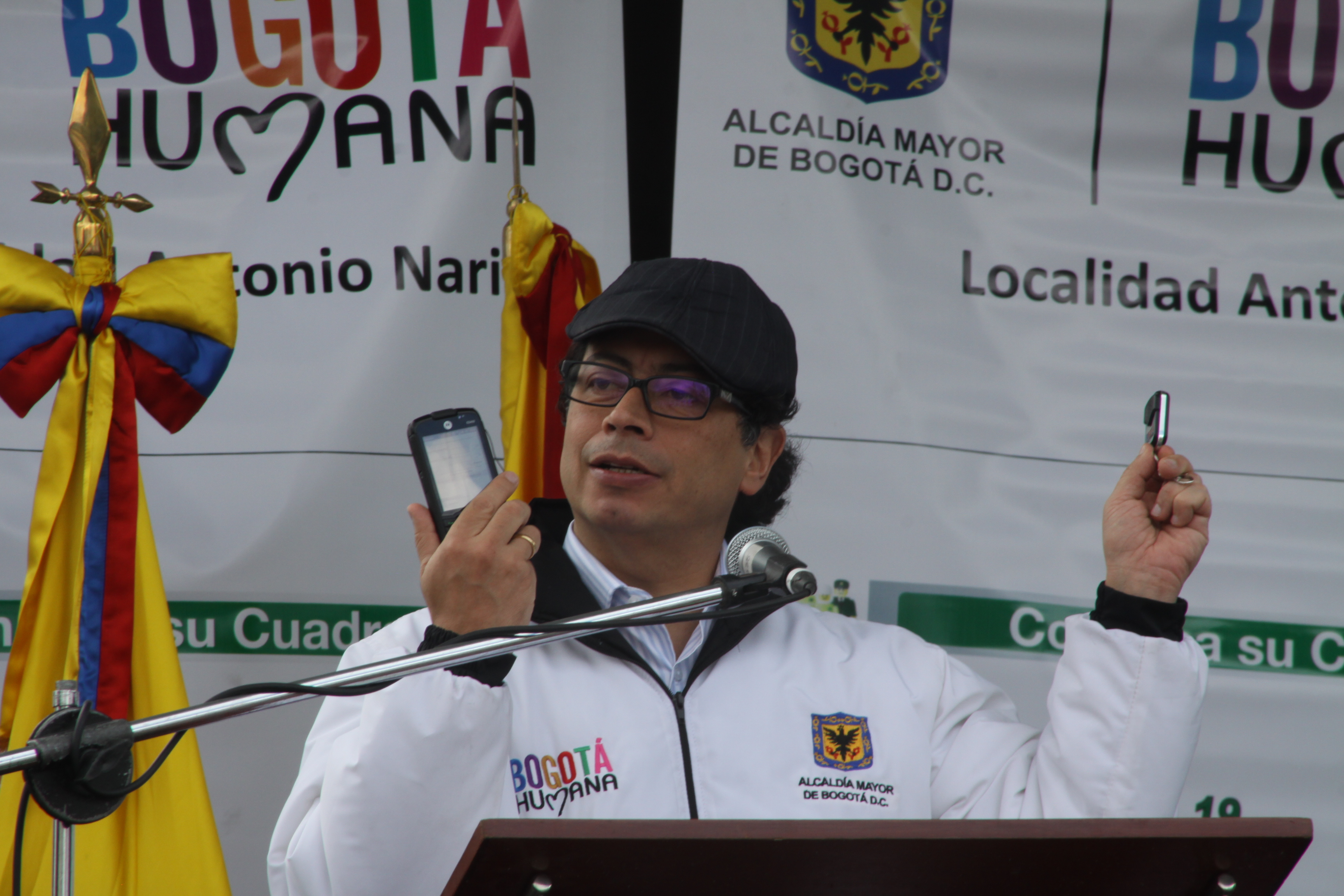 En marco del lanzamiento de los nuevos sistemas inalámbricos de seguridad en la Localidad de Antonio Nariño, el Alcalde Mayor de la ciudad Gustavo Petro Urrego, resaltó la efectiva y eficaz acción de la Policía Nacional para continuar reduciendo los índices de criminalidad en Bogotá.